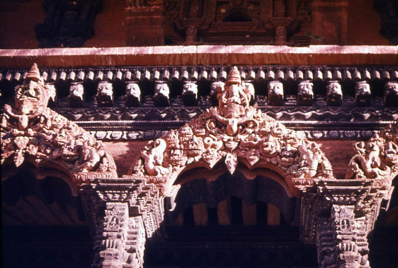 Деталь дворца в Катманду